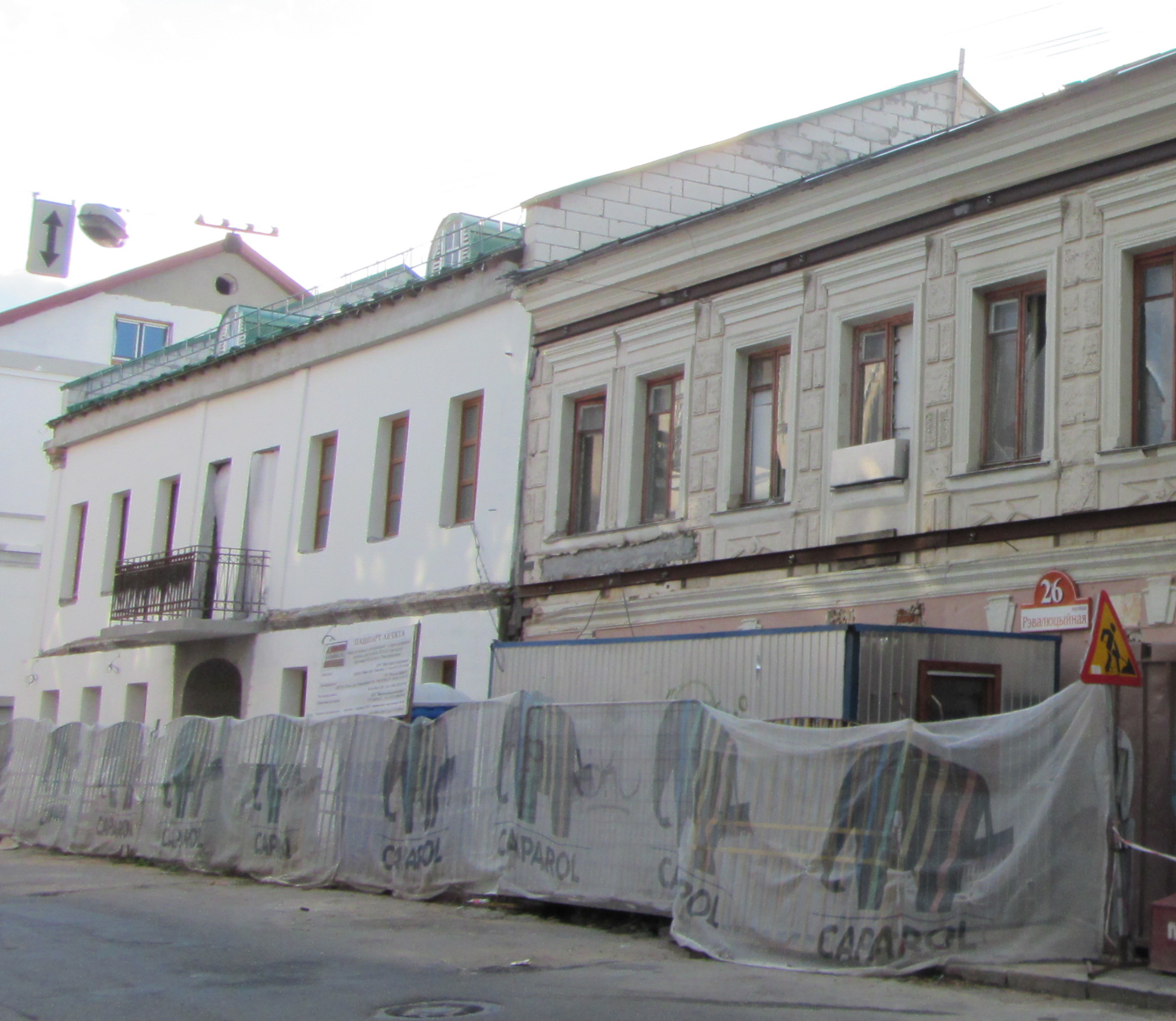 Беларуская (тарашкевіца): Вуліца Рэвалюцыйная, 26, 28